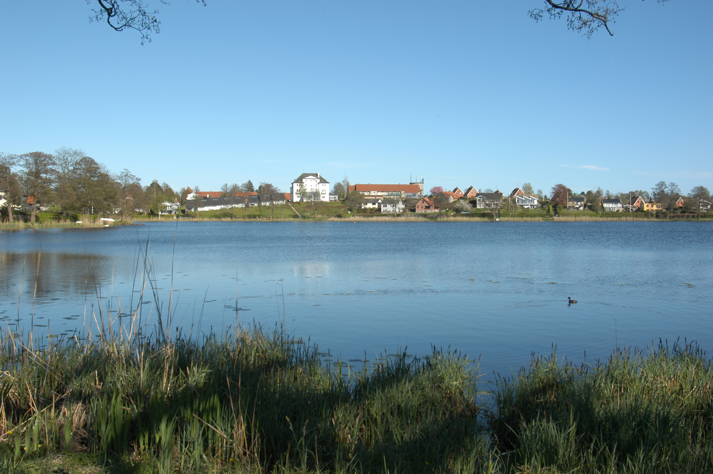 Hornbæk sø-Le lac de Hornbæk au Danemark-2007